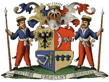 Zubovi suguvõsa krahvivapp